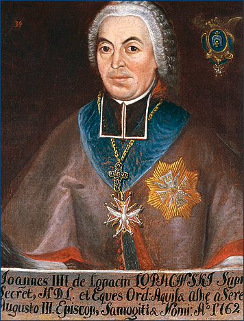 Беларуская (тарашкевіца): Партрэт Яна Дамініка Лапацінскага (Jan Daminik Łapacinski) (1708-1778)